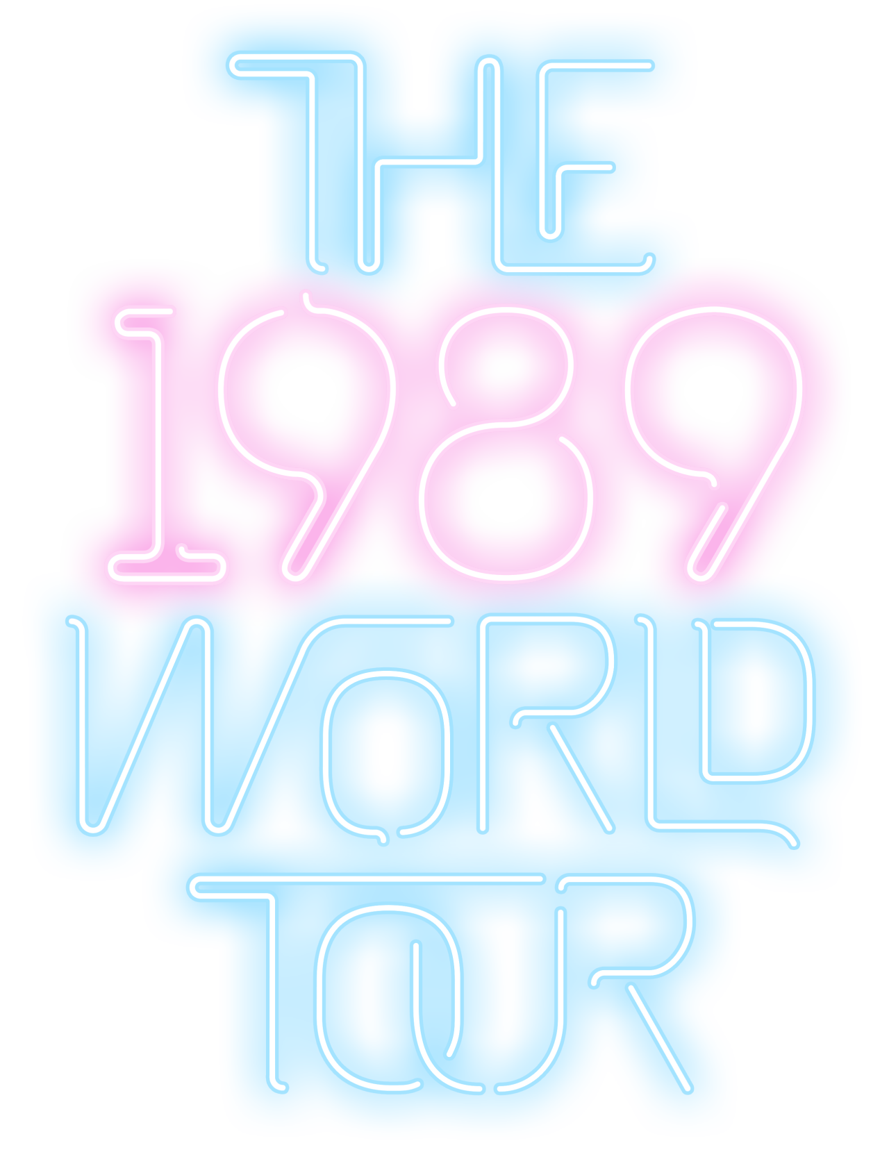 Logo del 1989 world tour di Taylor Swift